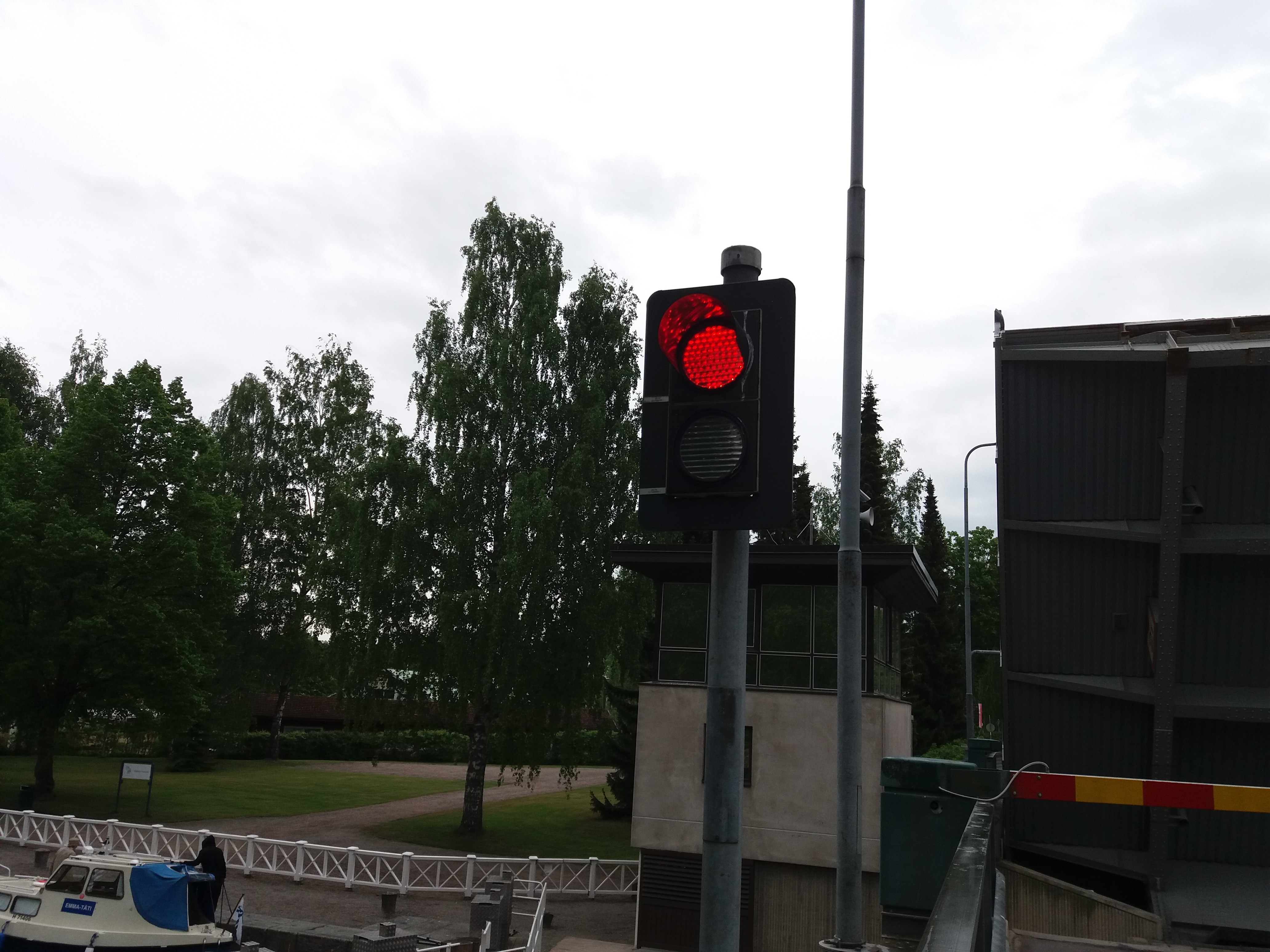 vääksyn kanavan tieliikenteen varoituslaitos näyttää kiinteää punaista.